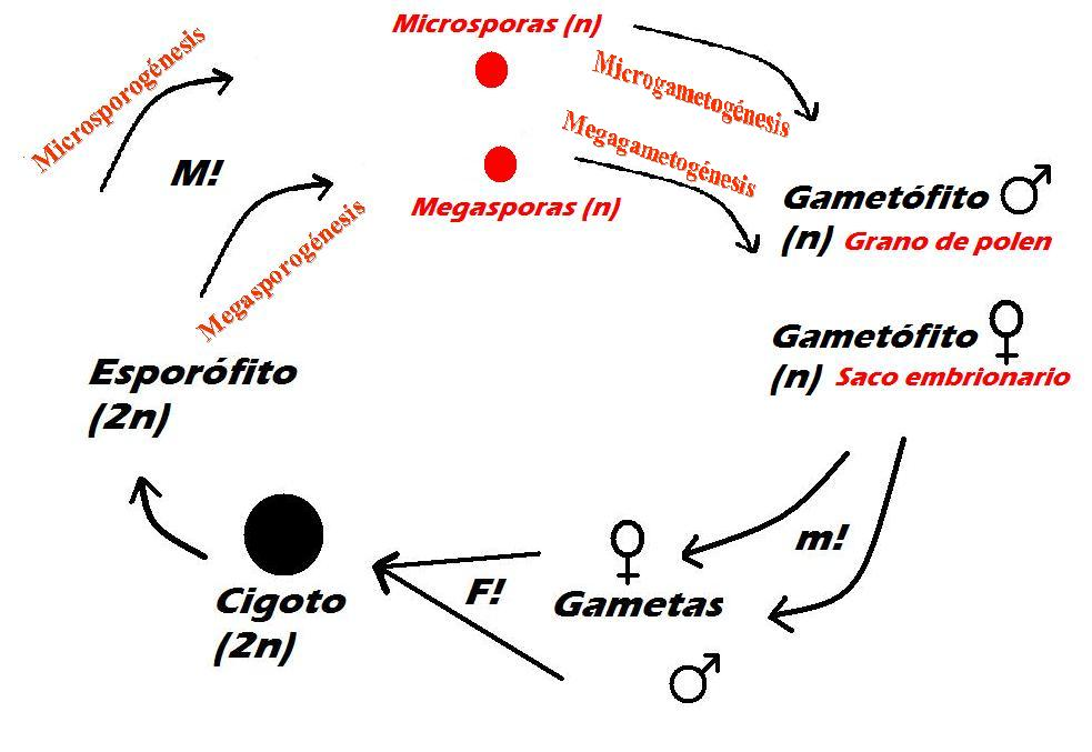 Ciclo de vida haplo-diplonte en angiospermas